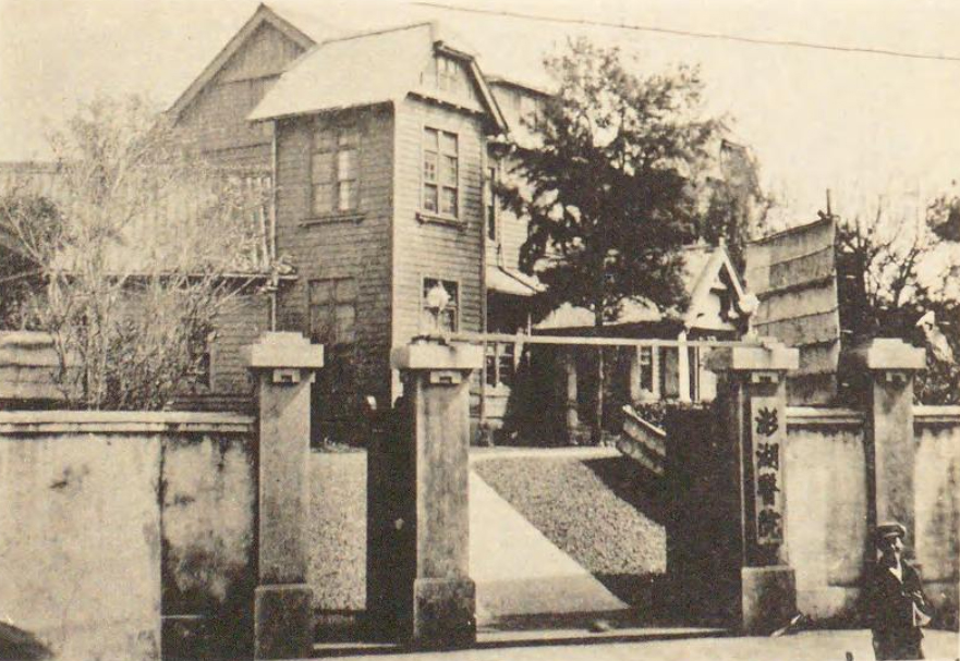 臺灣總督府澎湖醫院，已拆除